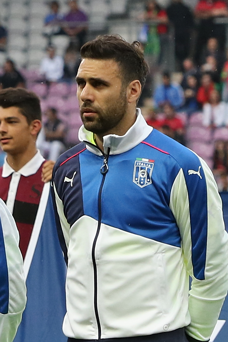 20150616 - Portugal - Italie - Genève - Salvatore Sirigu